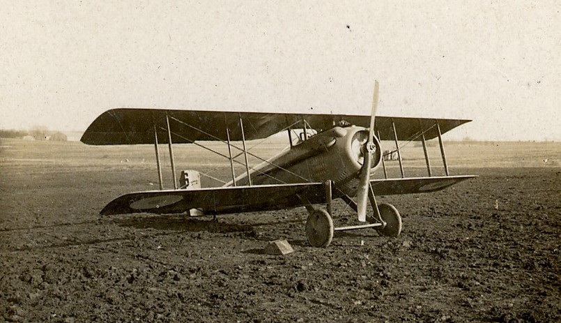 Un avion biplan Spad ( Moteur Hispano Suiza) sur le terrain d'aviation de Vadelaincourt (Meuse). 1917. Guerre 1914-1918.